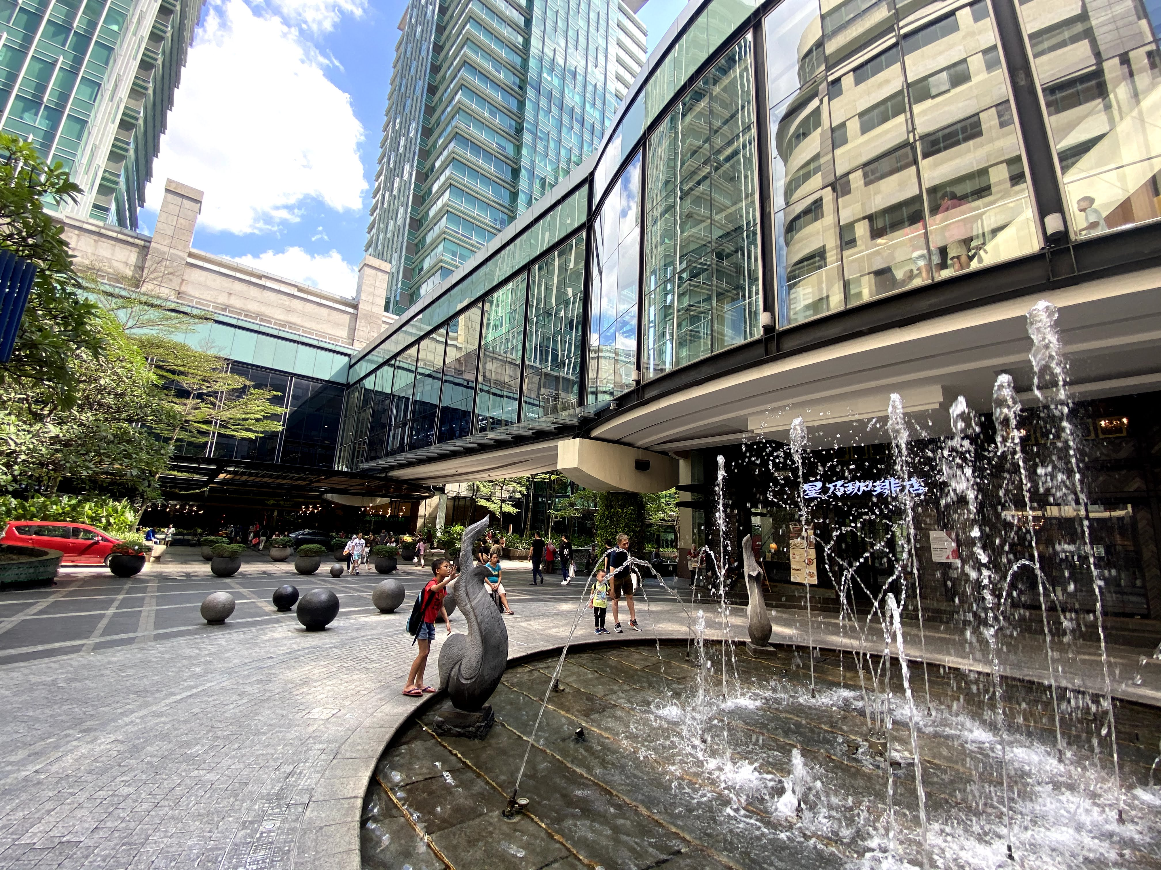 Mid Valley City Street view